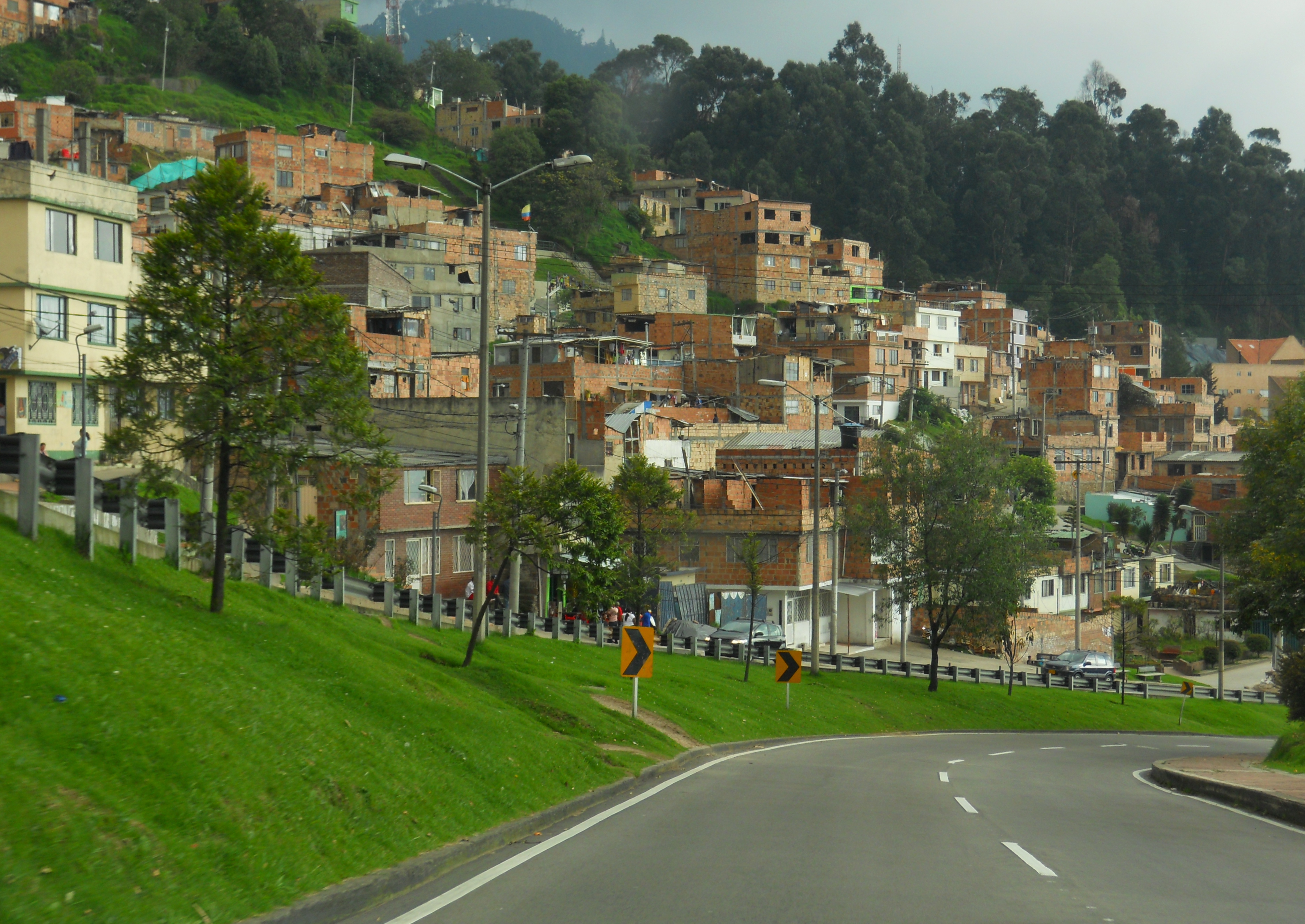 Parte baja del barrio Pardo Rubio en Chapinero, visto desde la avenida Circunvalar.